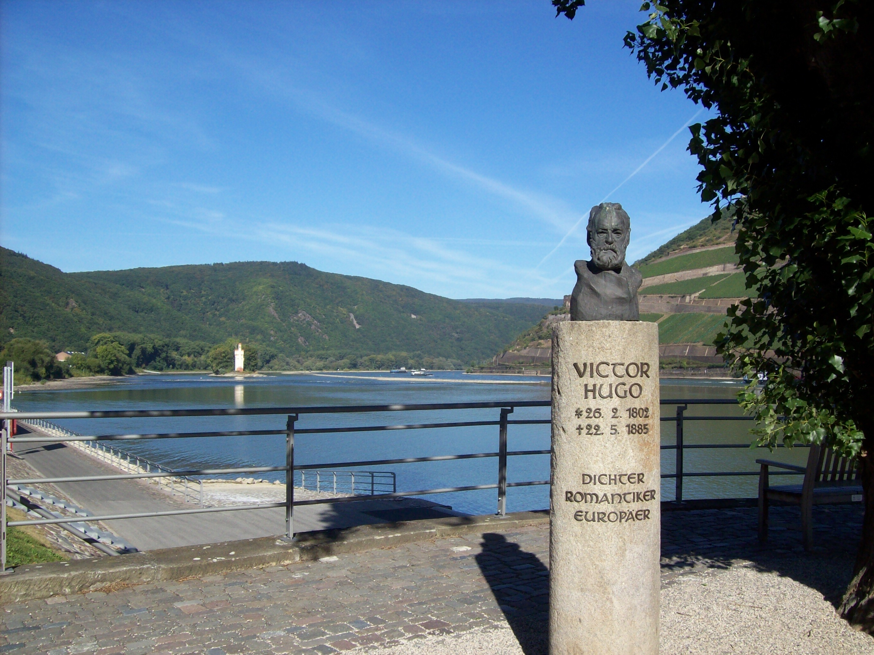 Denkmal von Victor Hugo in Bingen am Rhein